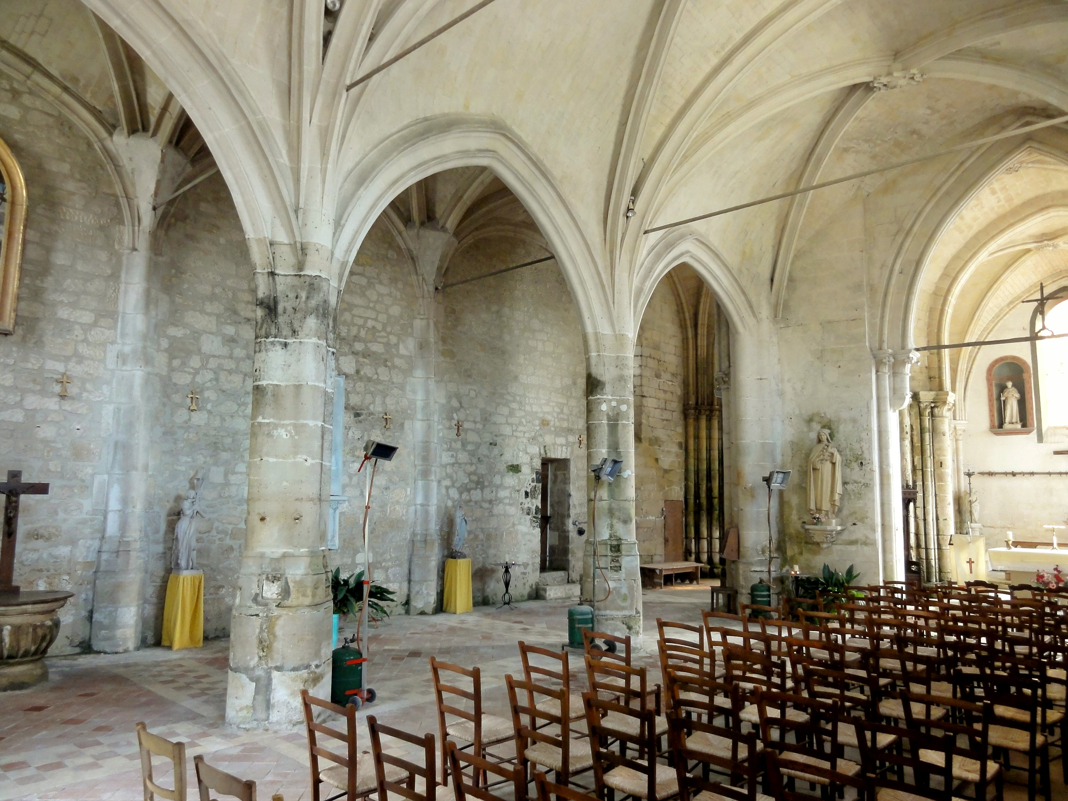 Les grandes arcades au nord de la nef.